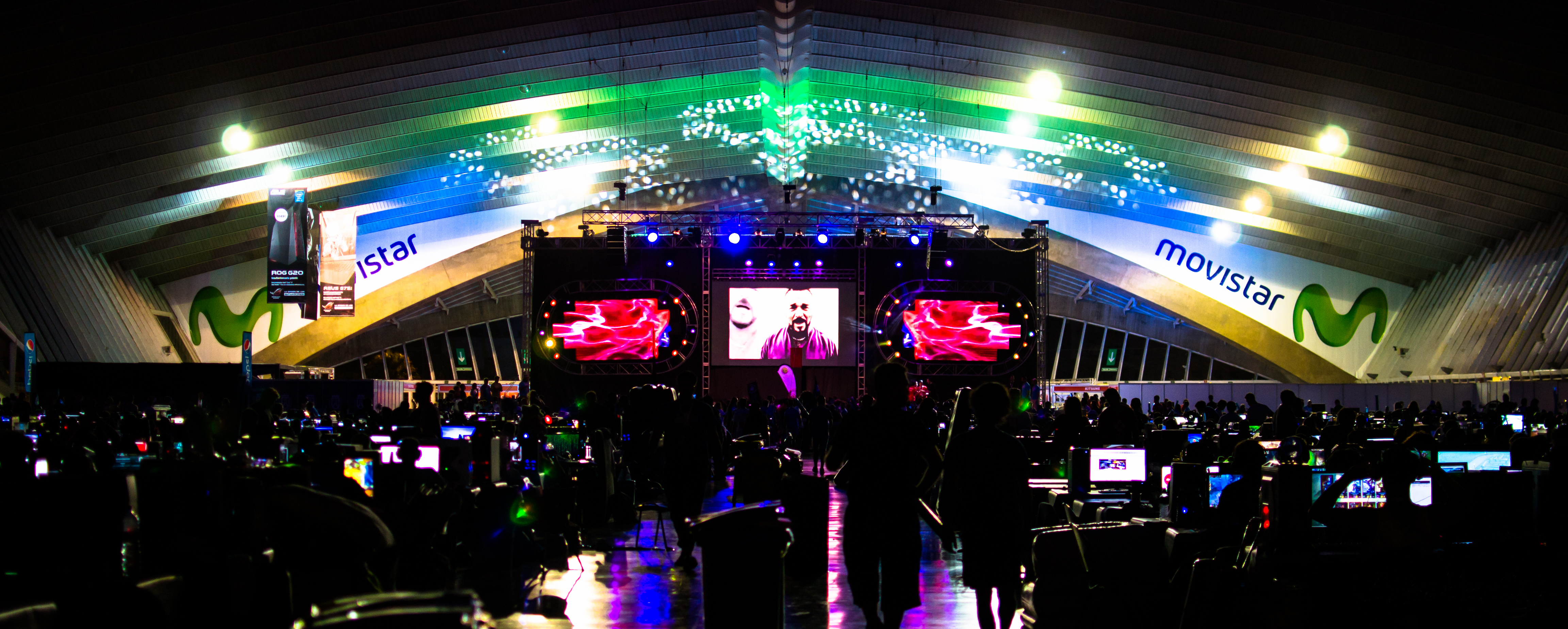 Tenerife Lan Party 2015, en Santa Cruz de Tenerife, durante la reproducción de vídeos virales